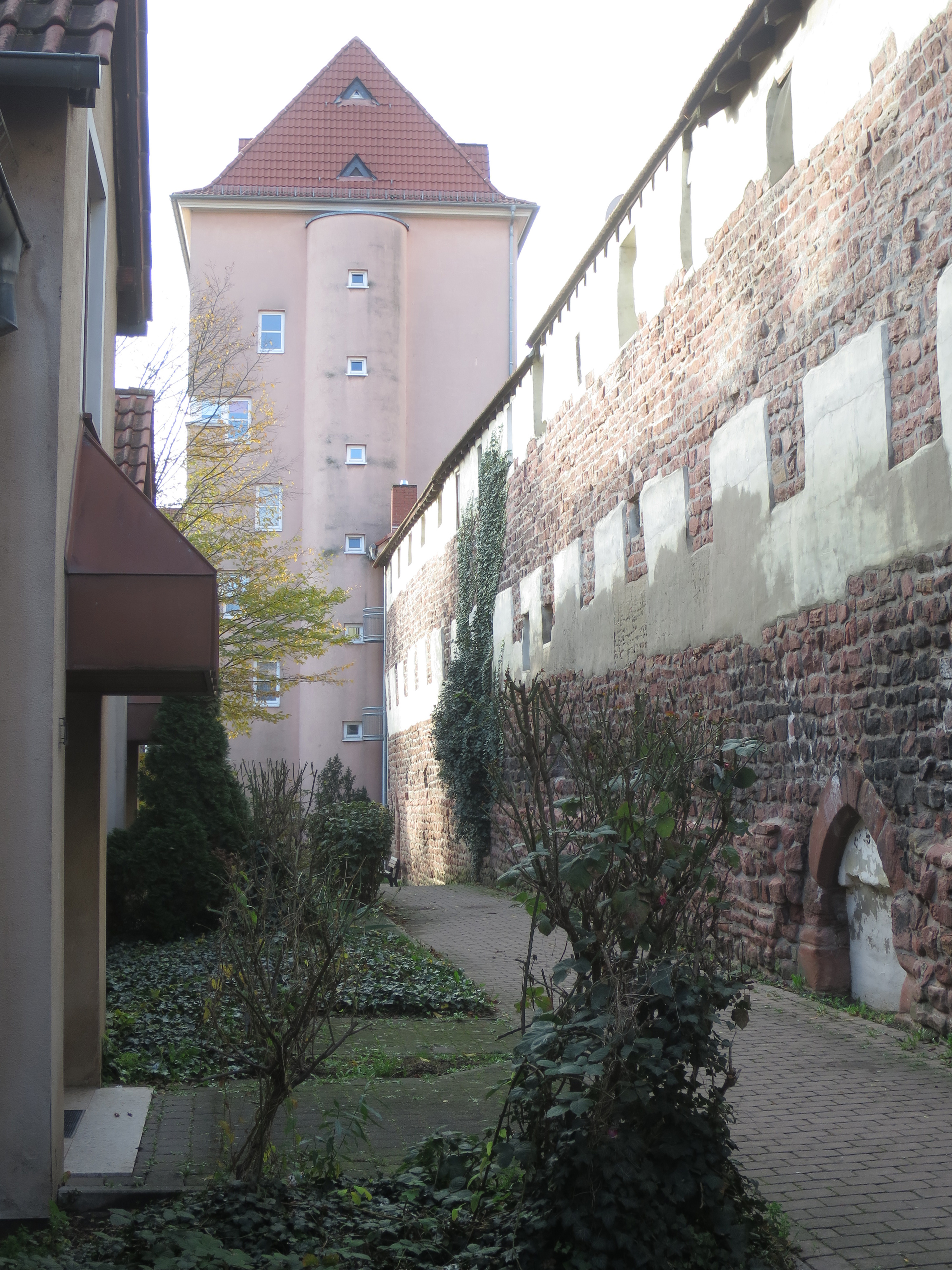 Stadtmauer Haspelgasse, Worms